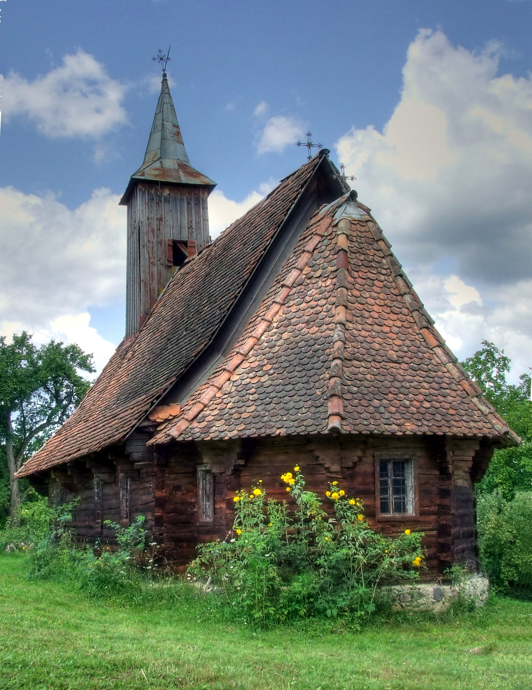 Biserica de lemn din Pietriş, judeţul Bistriţa-Năsăud.